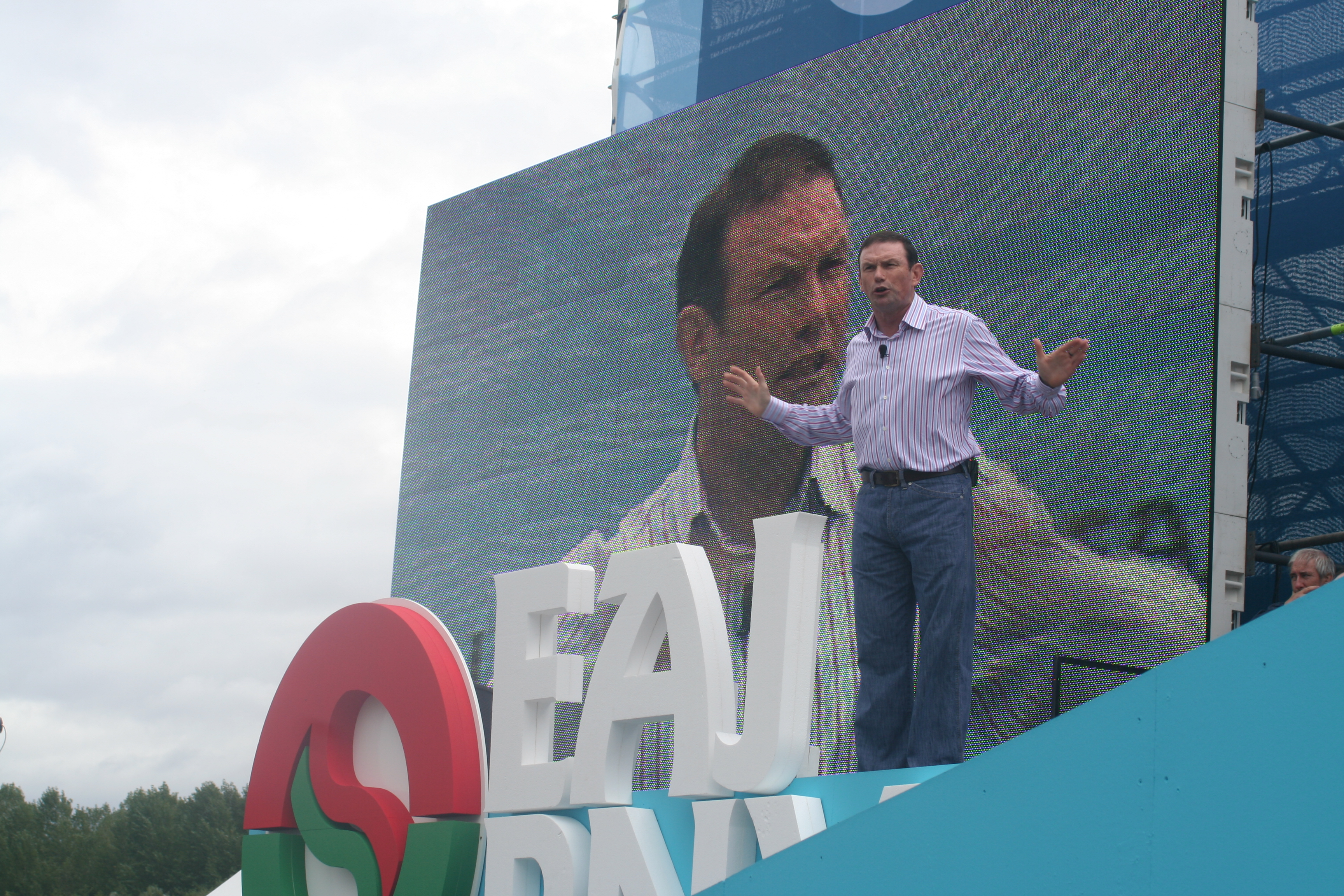 El lehendakari J.J. Ibarretxe en la tribuna durante el discurso pronunciado en el Alderdi Eguna (Día del Partido Nacionalista Vasco) del 2007